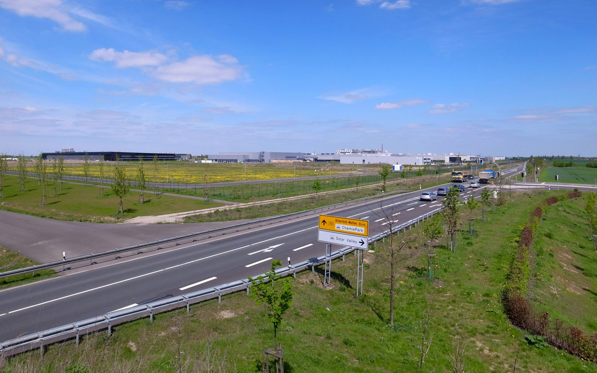 Solar Valley, Thalheim, Bitterfeld-Wolfen, Koordinaten: N51 38.243 E12 12.793